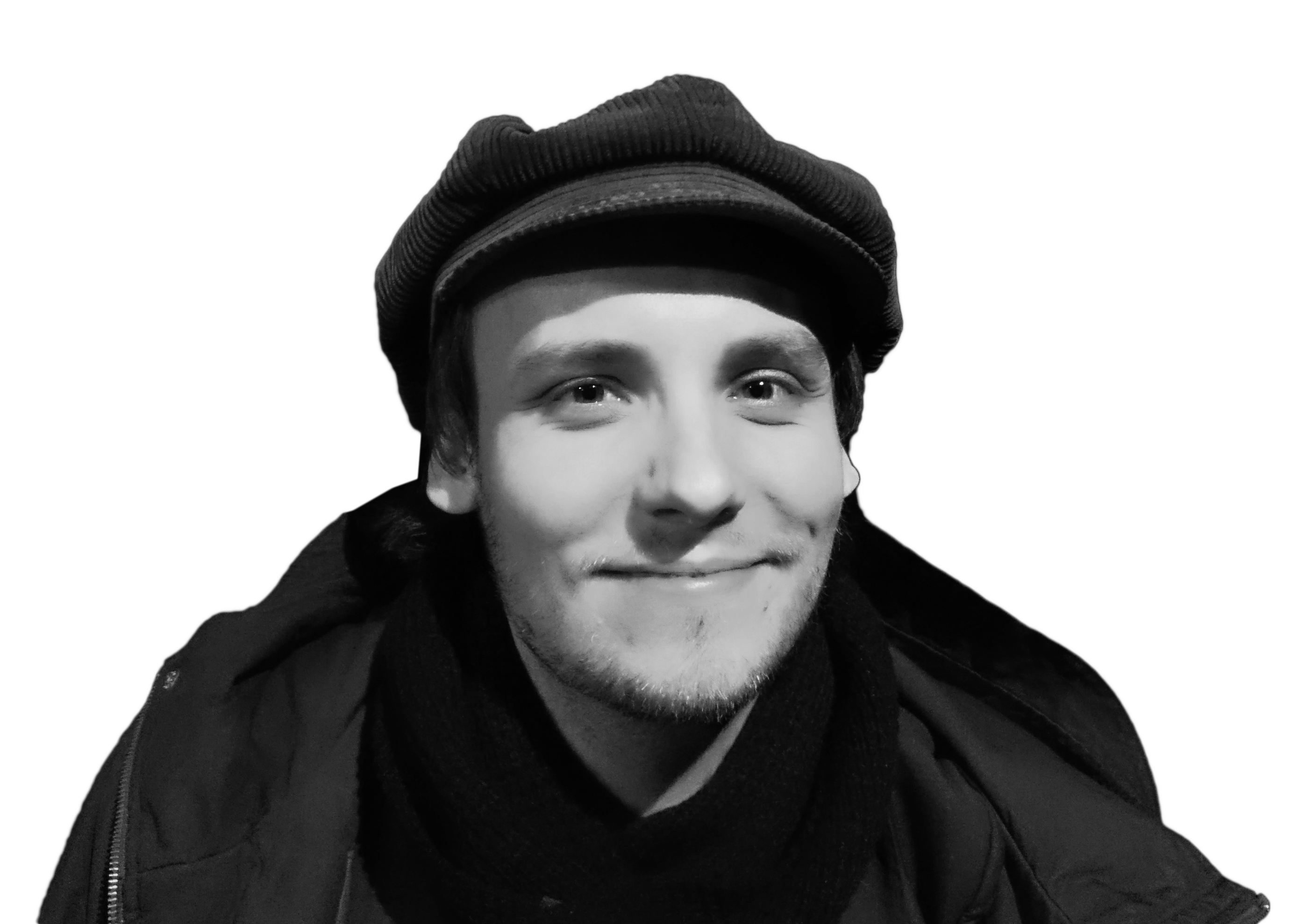 Ronnie Sandahl efter en visning av filmen "Svenskjävlar" på Folkteatern i Göteborg.